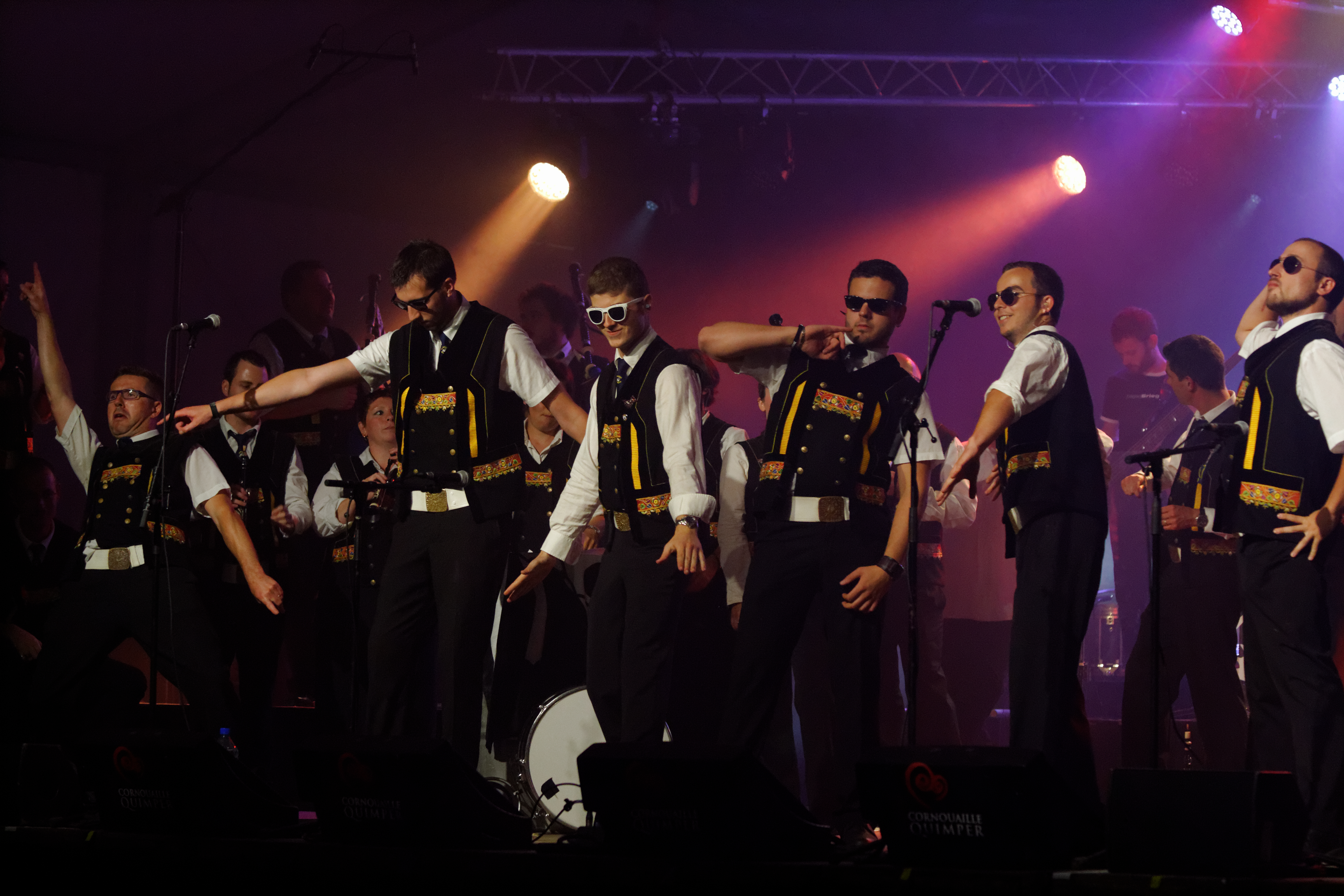 Création « Encore » du Bagad Brieg lors du festival de Cornouaille le samedi 27 juillet 2013 à l'Espace Évêché.